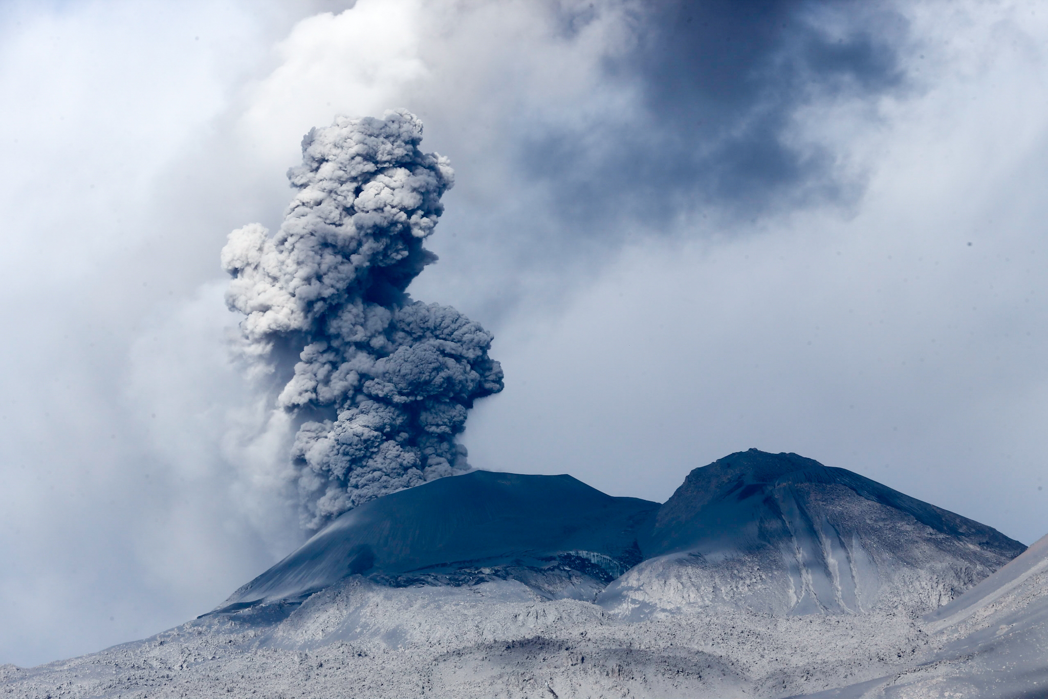 Actividad volcánica en el Sabancaya Durante una visita al valle del Colca, el ministro Ministro de Defensa del Perú pudo observar, en un sobrevuelo, las columnas de gases y ceniza que se levantan desde el cráter del Sabancaya, que según el Instituto Geofísico del Perú (IGP) tienen una altura de aproximadamente 3,200 metros. Además, de acuerdo a los reportes de esta entidad científica, el volcán tiene actualmente una actividad explosiva de niveles moderados, con un promedio de 44 explosiones por día en la última semana. La dispersión de gases y ceniza alcanza un radio mayor a los 40 kilómetros.